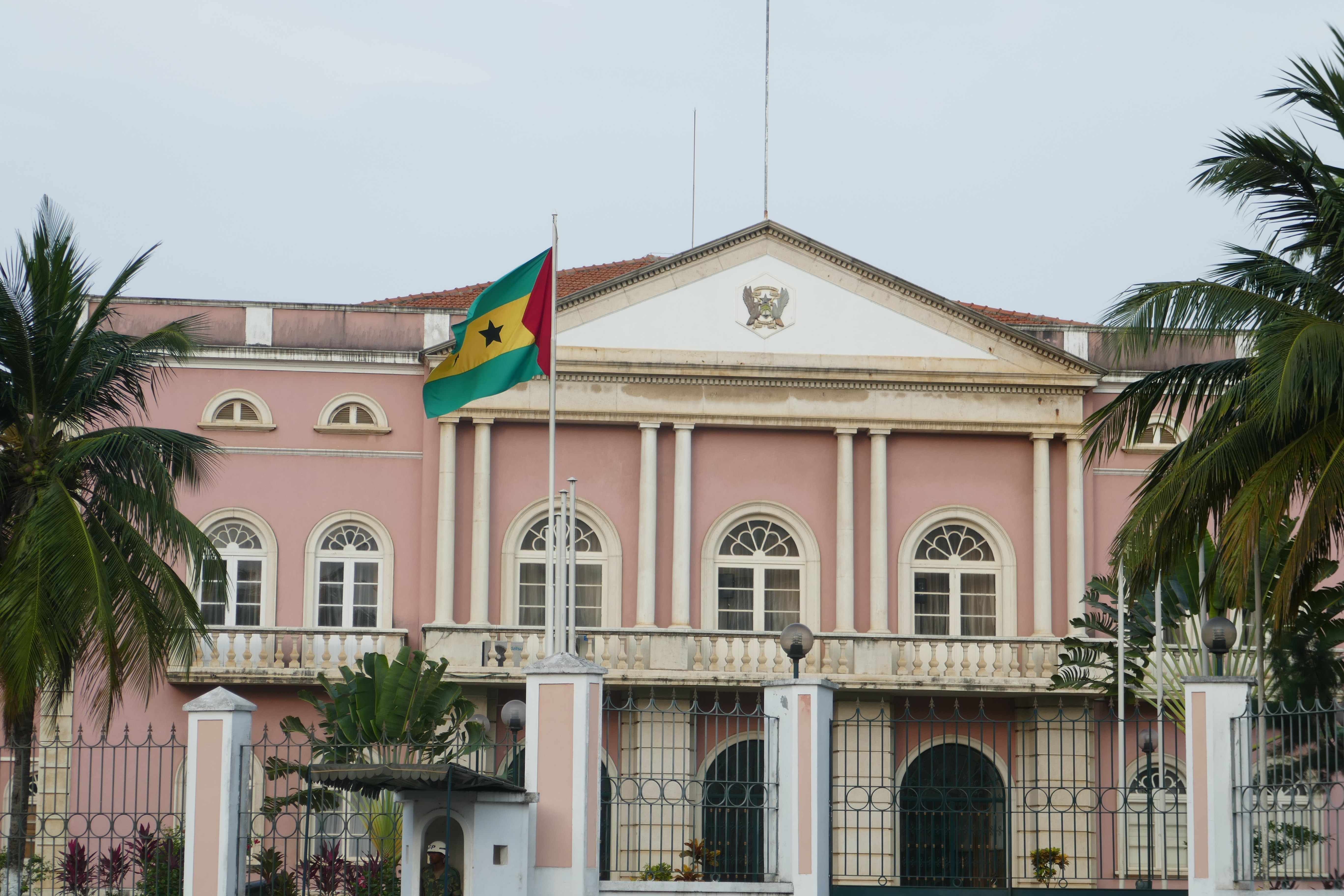 Palais présidentiel à São Tomé, capitale de São Tomé-et-Principe.